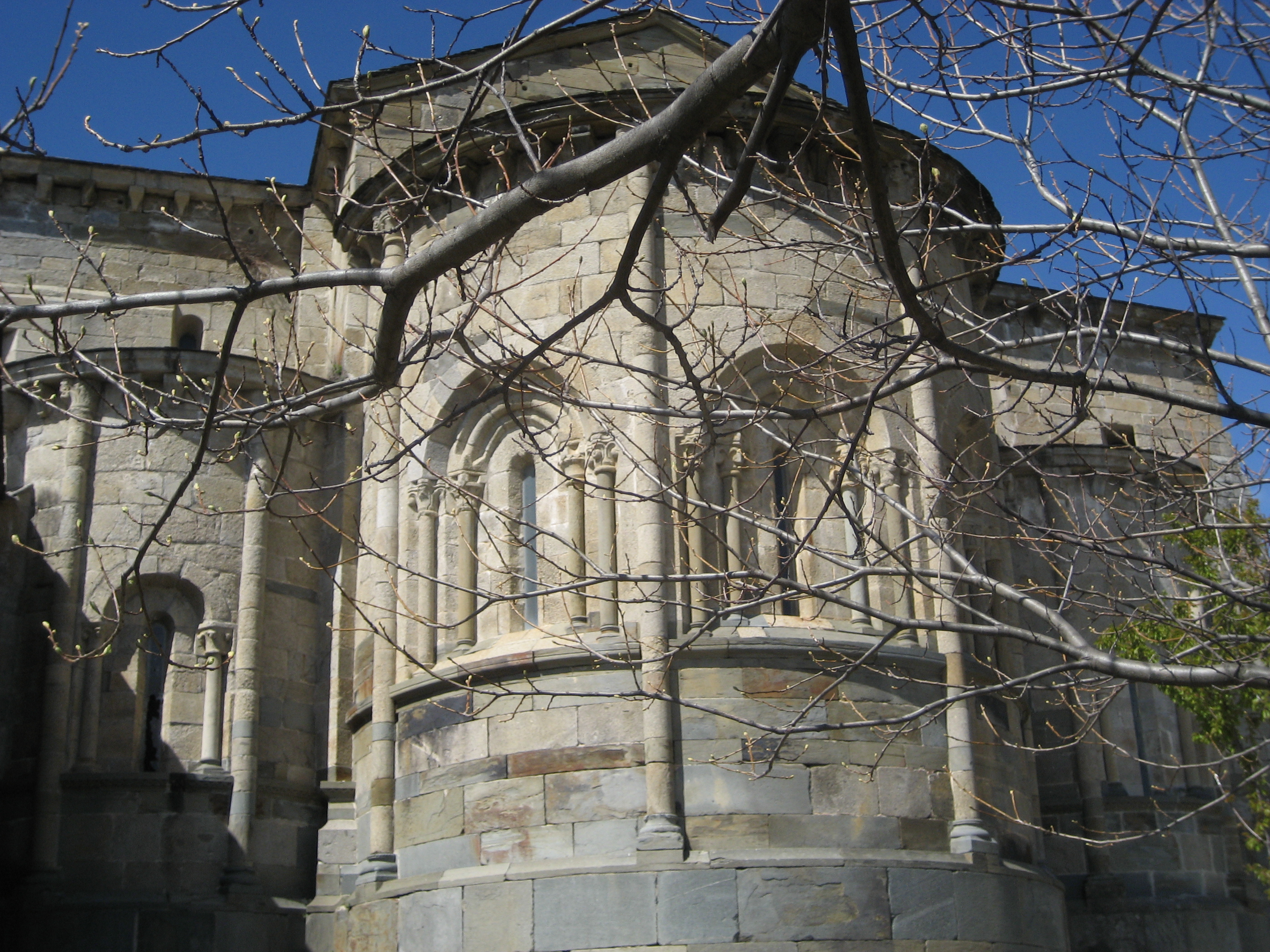 Monasterio románico de San Martín de Castañeda, Zamora